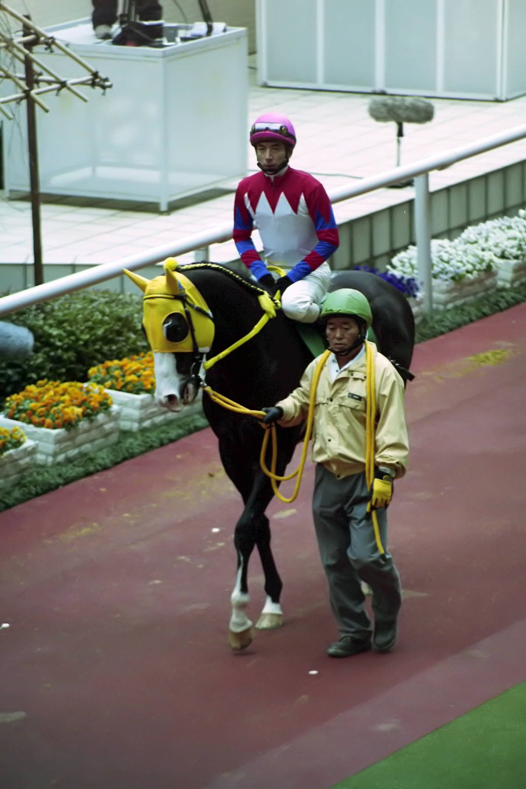 2005年2月27日に阪神競馬場の第11競走で行われた「第49回阪急杯」のパドックで、16番カルストンライトオ号と大西直宏騎手を撮影したもの。